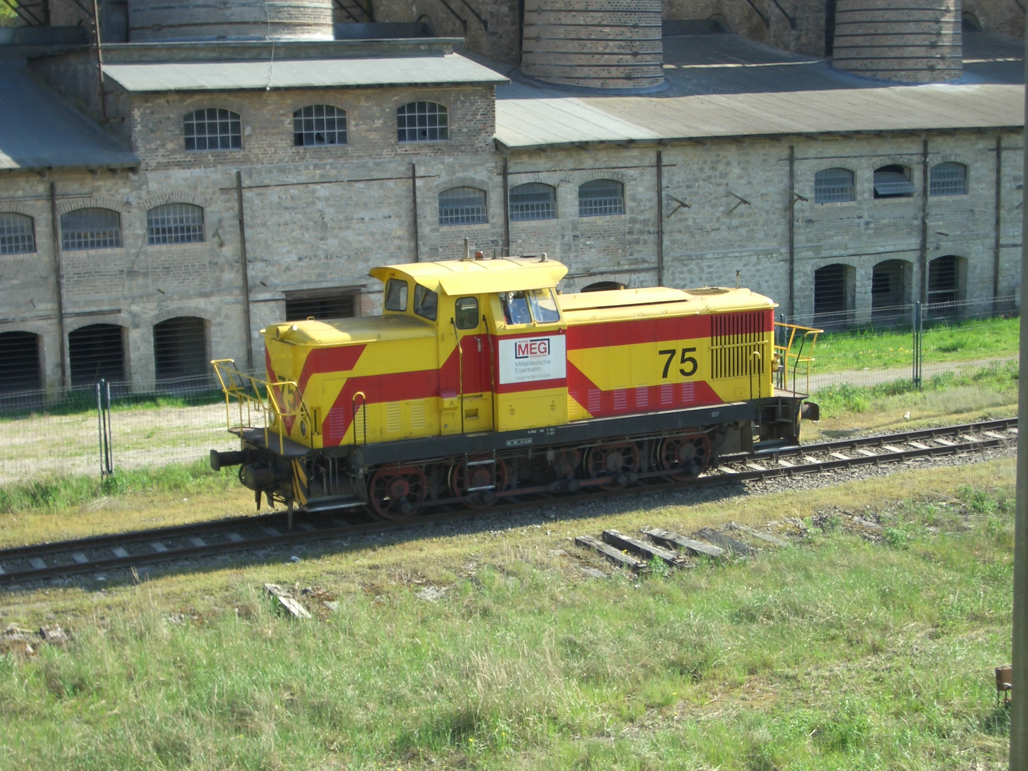 Kalkwerk Rüdersdorf